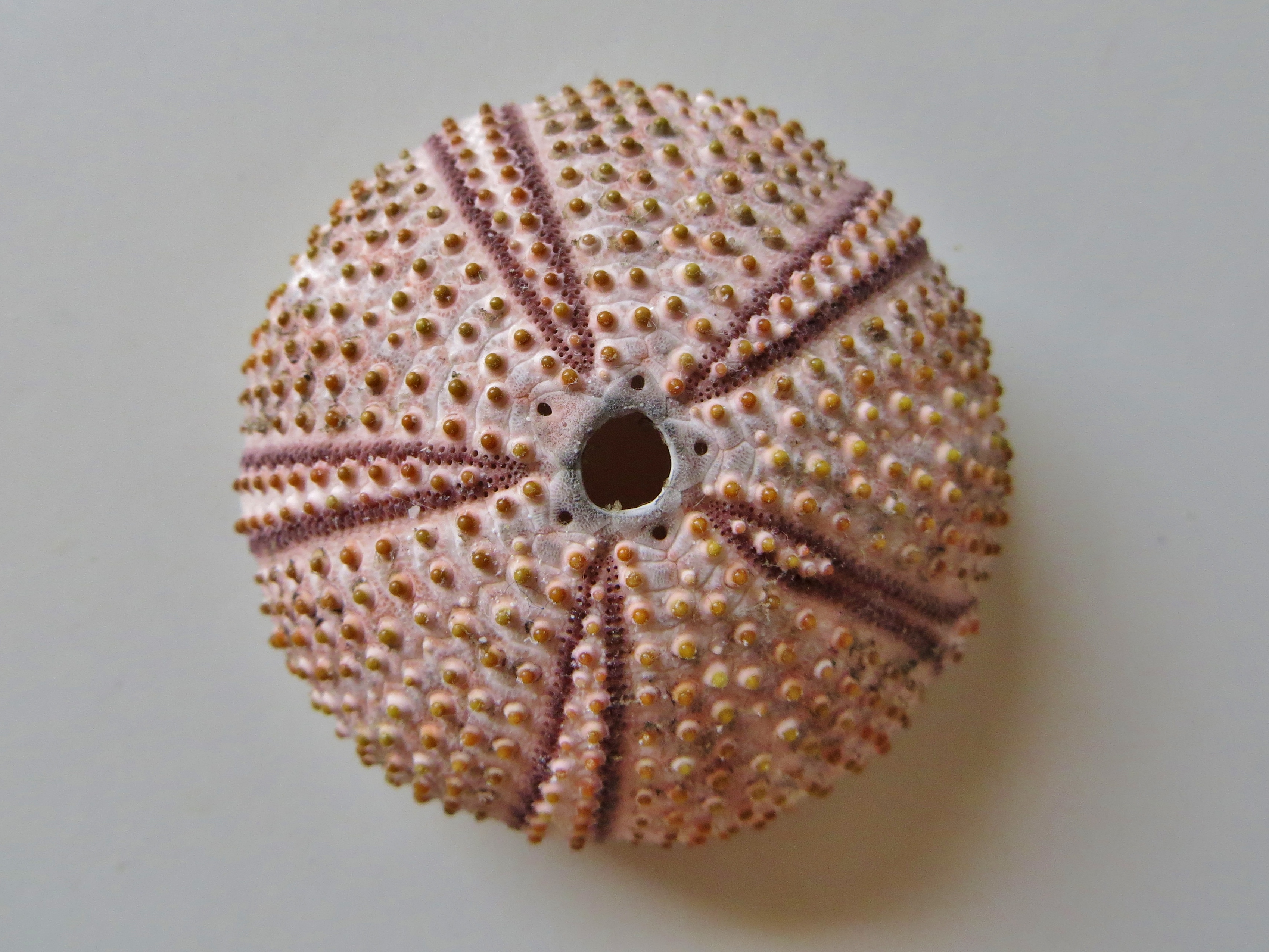 Un test (coquille) d'oursin noir Arbacia lixula, en vue apicale (Mediterranée : Agay, France). On note une anomalie de développement sur un des ambulacres.